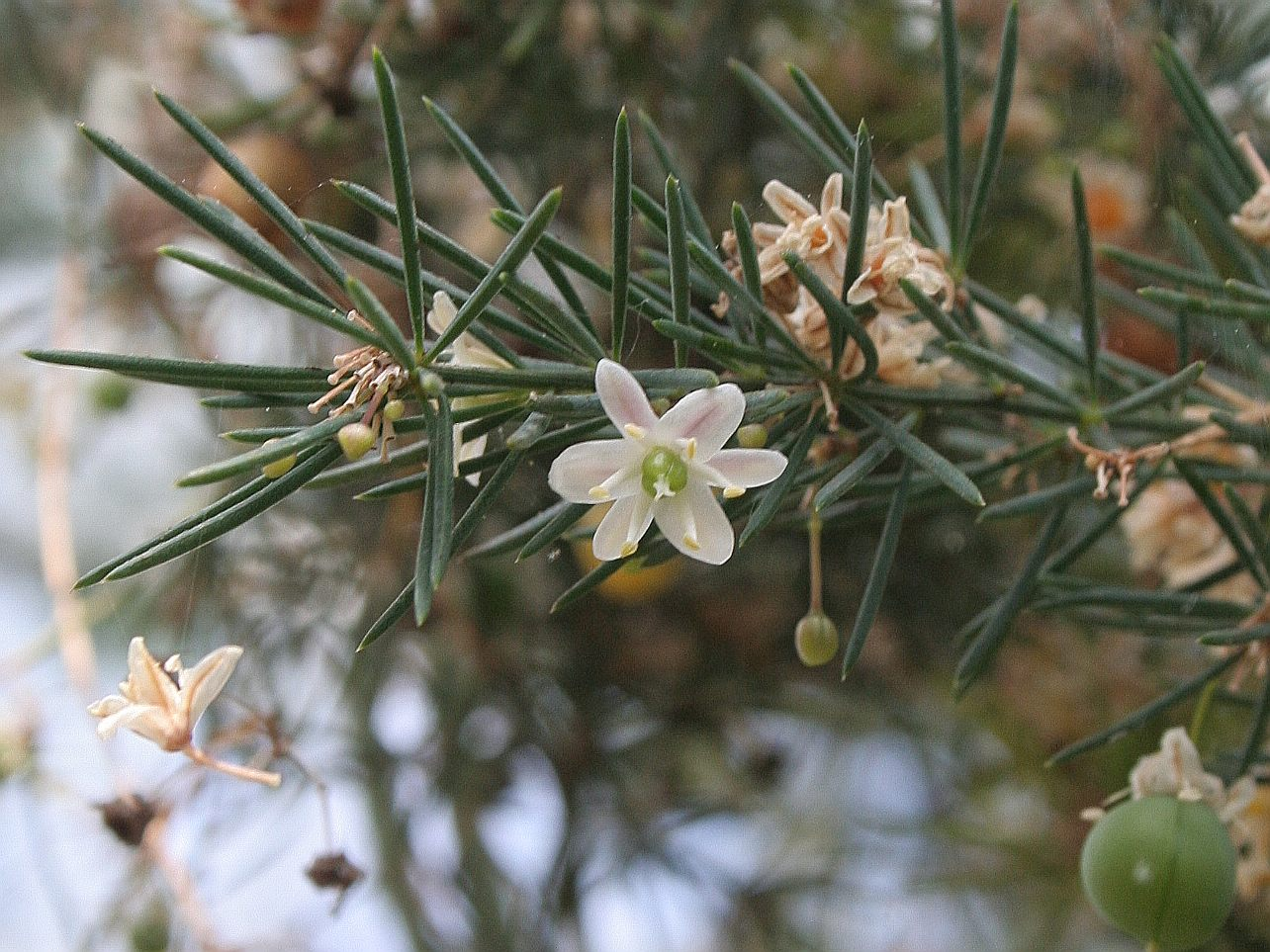 Asparagus fallax Conservatoire botanique national de Brest, France, Juin 2007